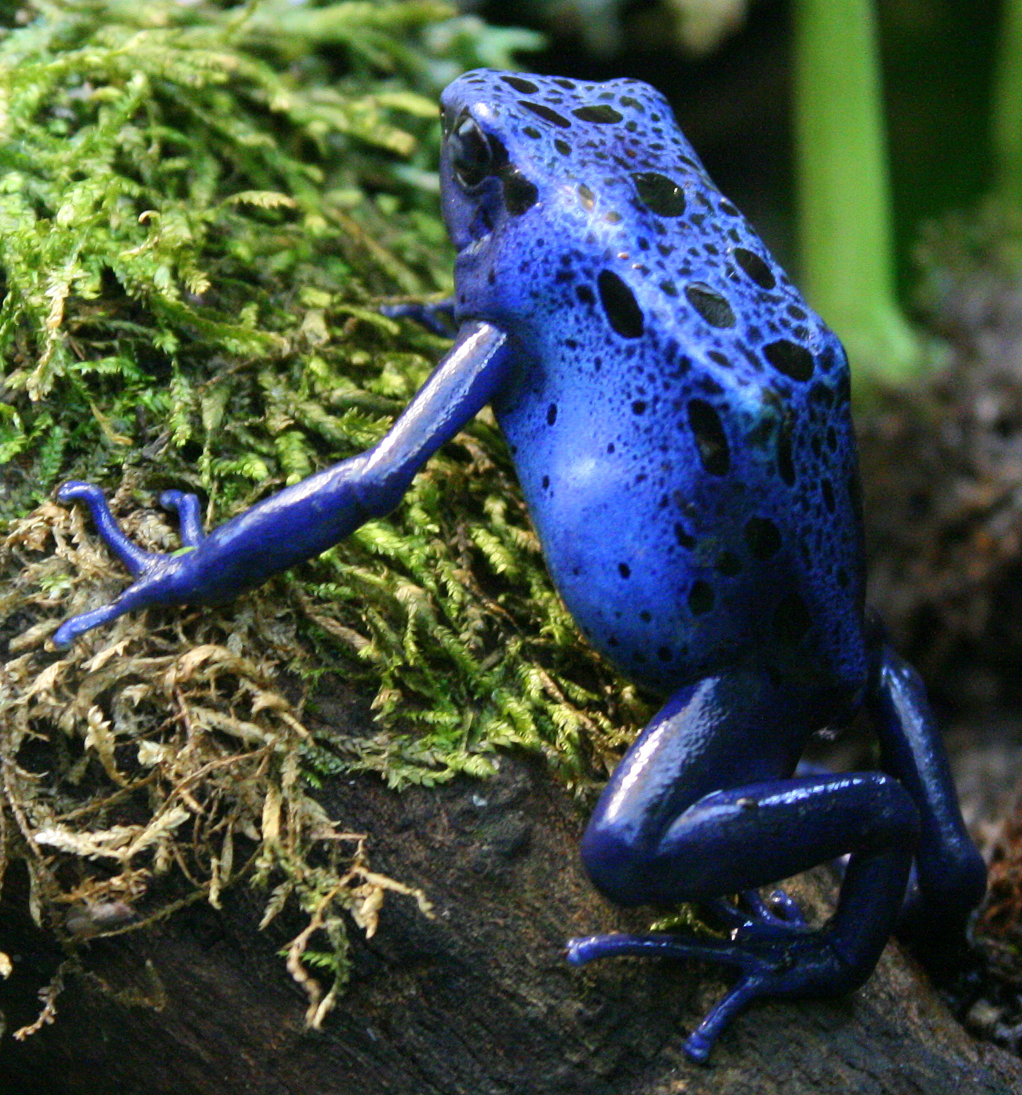 Dendrobates azureus at London Zoo